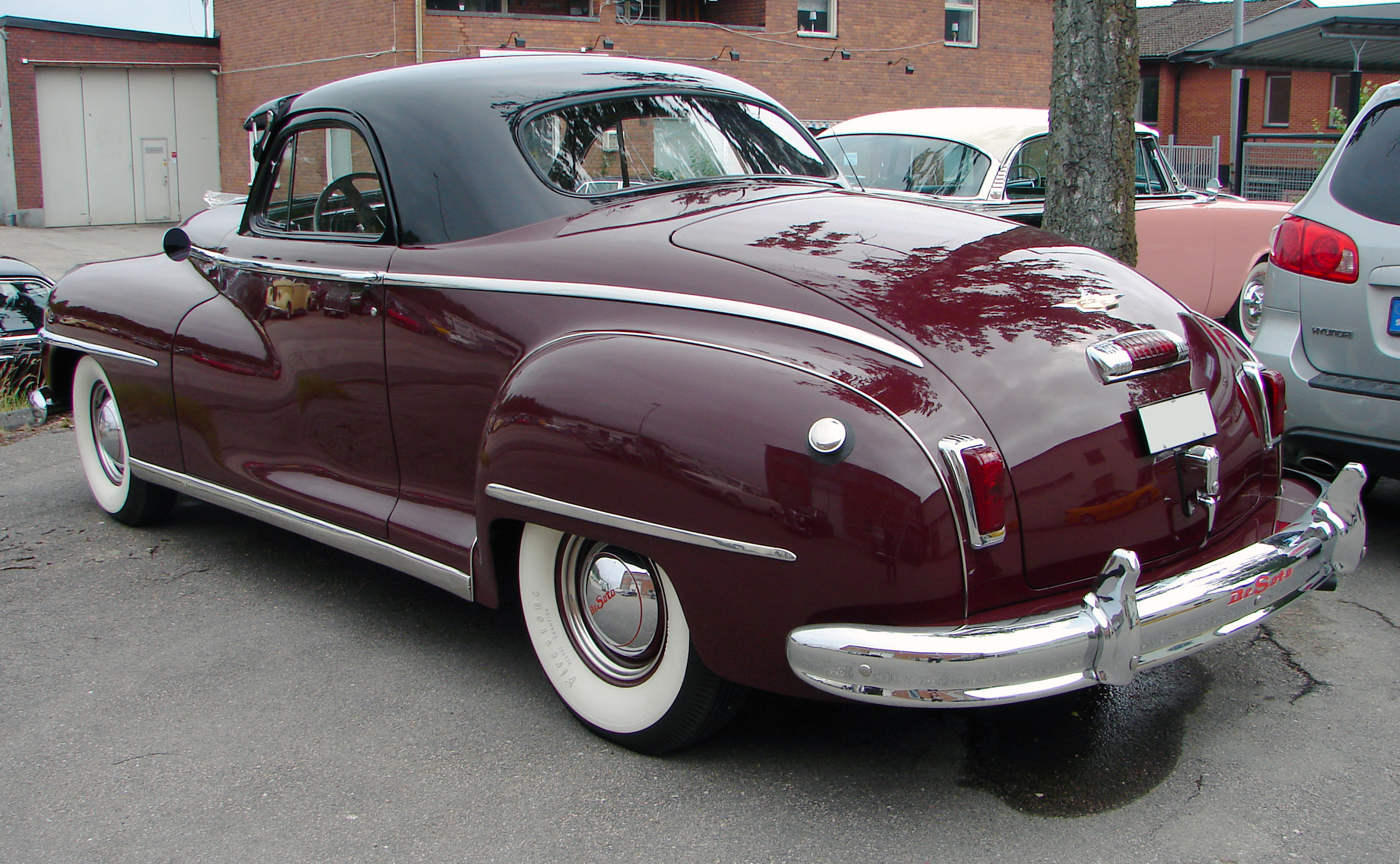 De Soto De Luxe 1946 in Trollhättan, Sweden